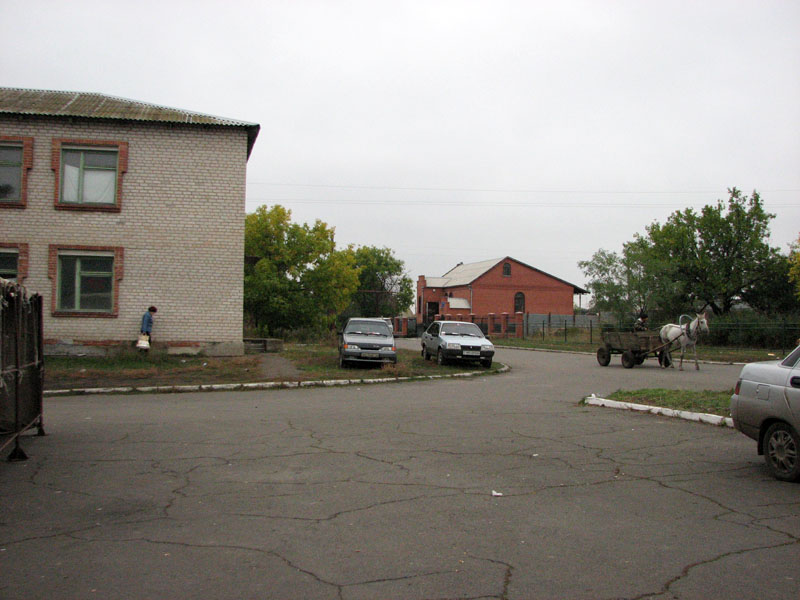 с. Малоянисоль, Володарского района, Донецкой области, Украина